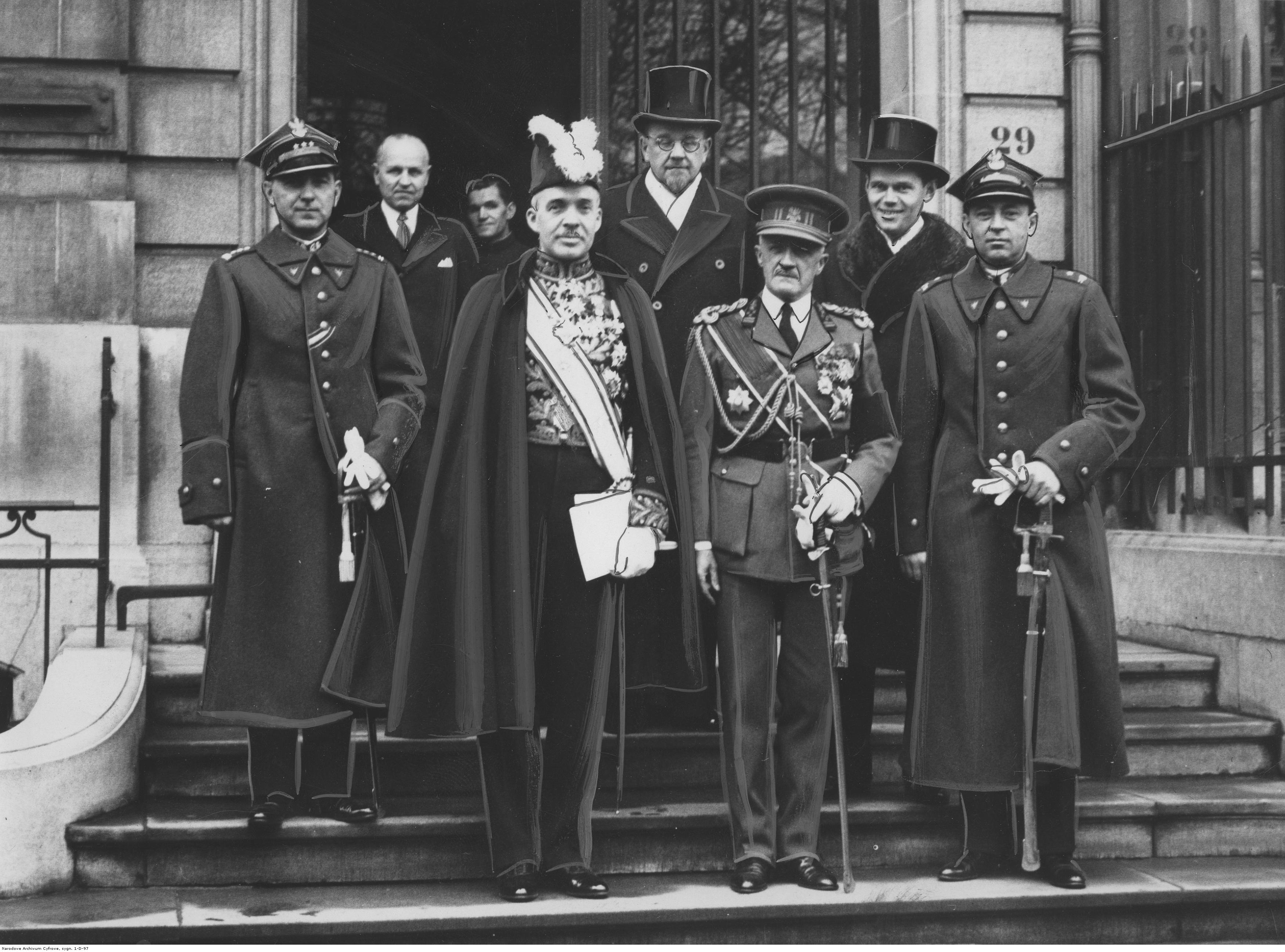 Złożenie listów uwierzytelniających królowi belgijskiemu Leopoldowi III przez posła nadzwyczajnego i ministra pełnomocnego Polski w Belgii Michała Mościckiego 14 grudnia 1937 r. Poseł Michał Mościcki (drugi z lewej w pierwszym rzędzie) w towarzystwie attache wojskowego Polski w Paryżu płk. Wojciecha Fydy (pierwszy z lewej), generała Termonia (drugi z prawej w pierwszym rzędzie), mjr. Gustawa Łowczowskiego (pierwszy z prawej), sekretarza Poselstwa RP w Belgii Romana Szuyskiego (pierwszy z prawej w drugim rzędzie) i radcy handlowego Poselstwa RP w Belgii Leona Litwińskiego (drugi z prawej w drugim rzędzie) przed udaniem się na zamek w Brukseli w celu złożenia listów uwierzytelniających królowi Belgii Leopoldowi III. Koncern Ilustrowany Kurier Codzienny - Archiwum Ilustracji. Sygnatura: 1-D-97